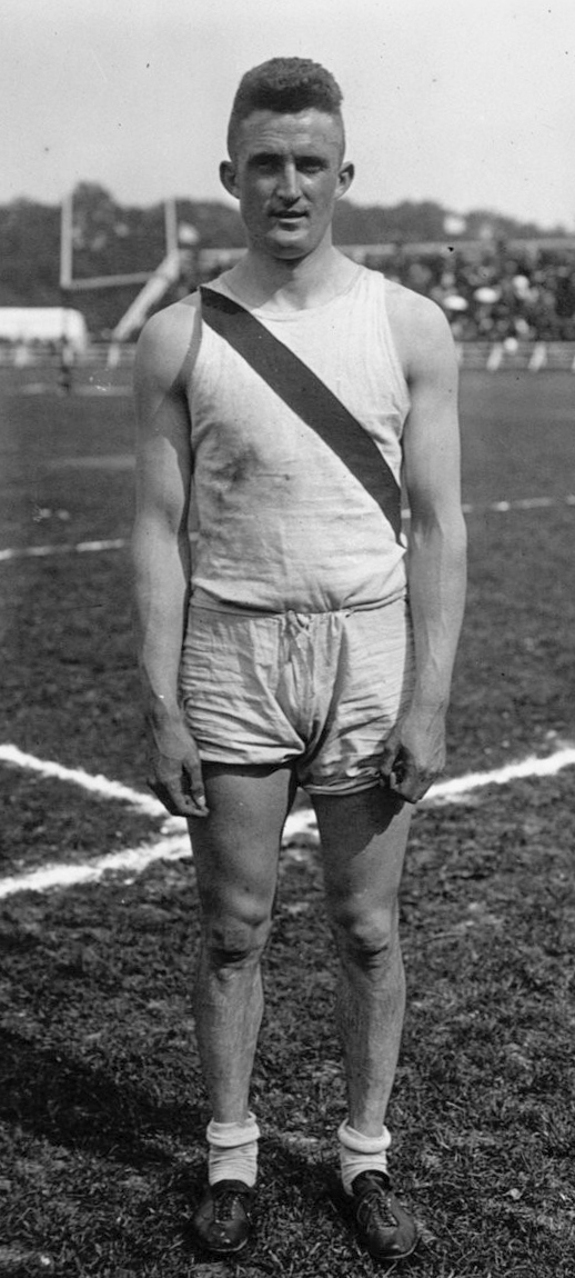 Au stade de Colombes, finales éliminatoires américaines : Floyd gagnant du saut à la perche : [photographie de presse] / Agence Meurisse